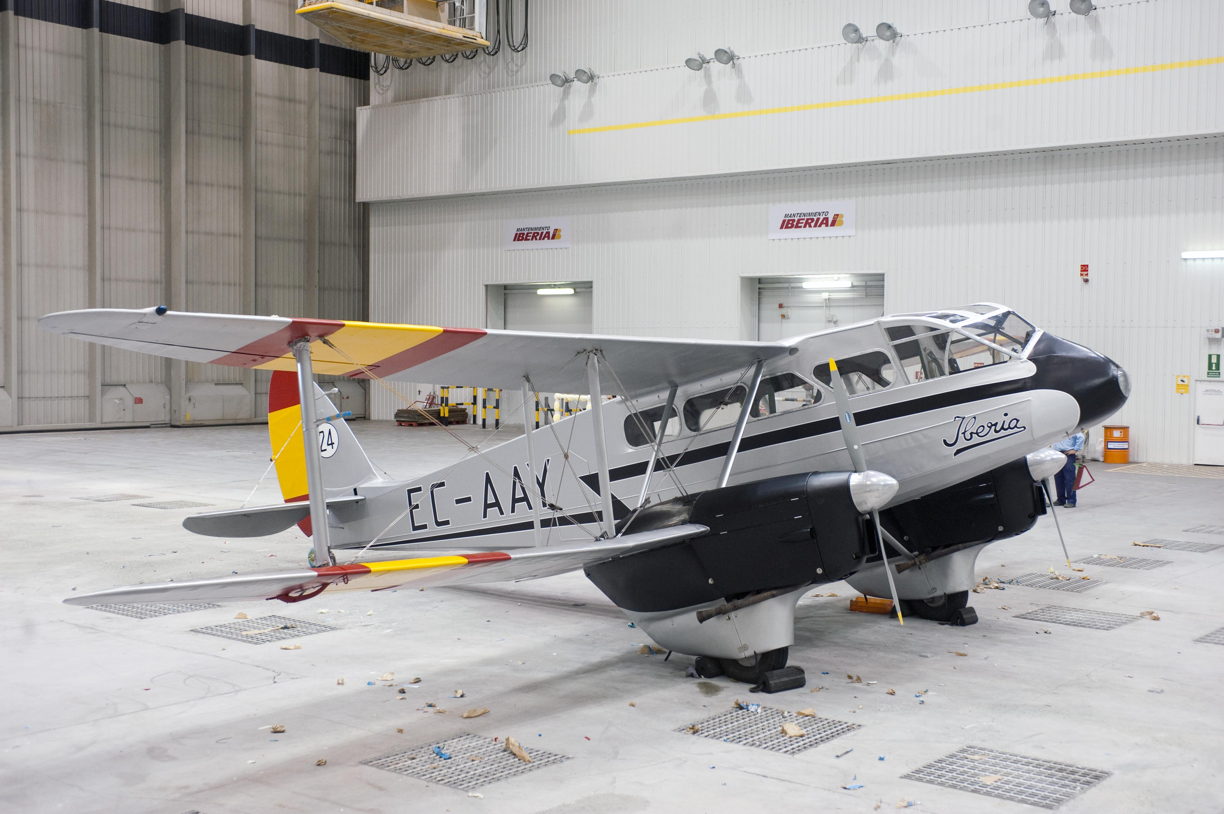 Una vez terminados los trabajos de pintura en La Muñoza (hangar 7) con los colores e imagen de Iberia de los años 30